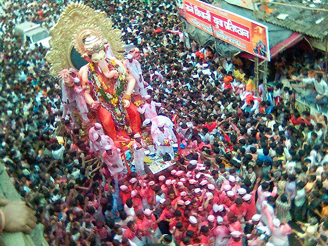 visarajan pics in mumbai